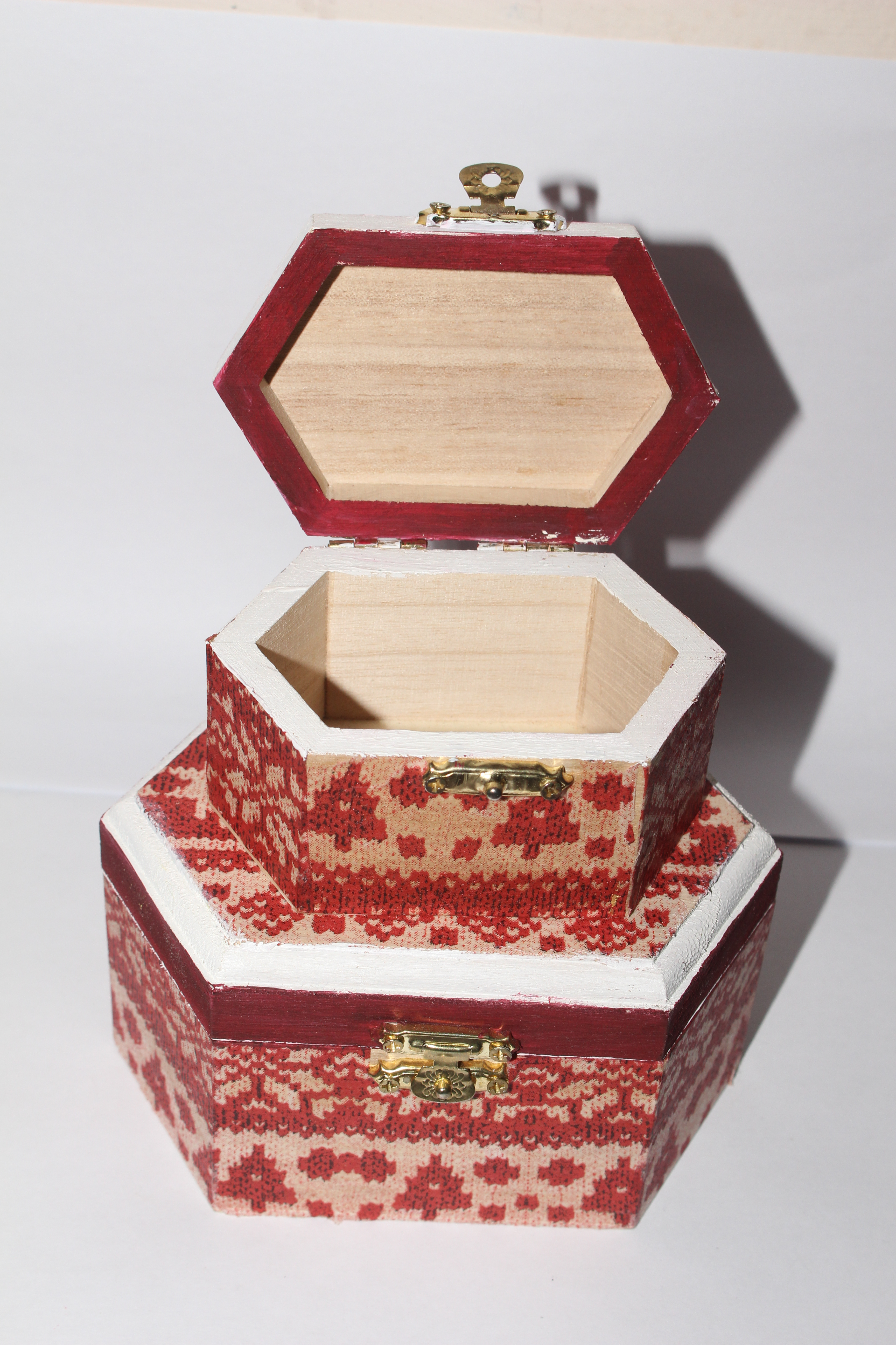 kuti druri